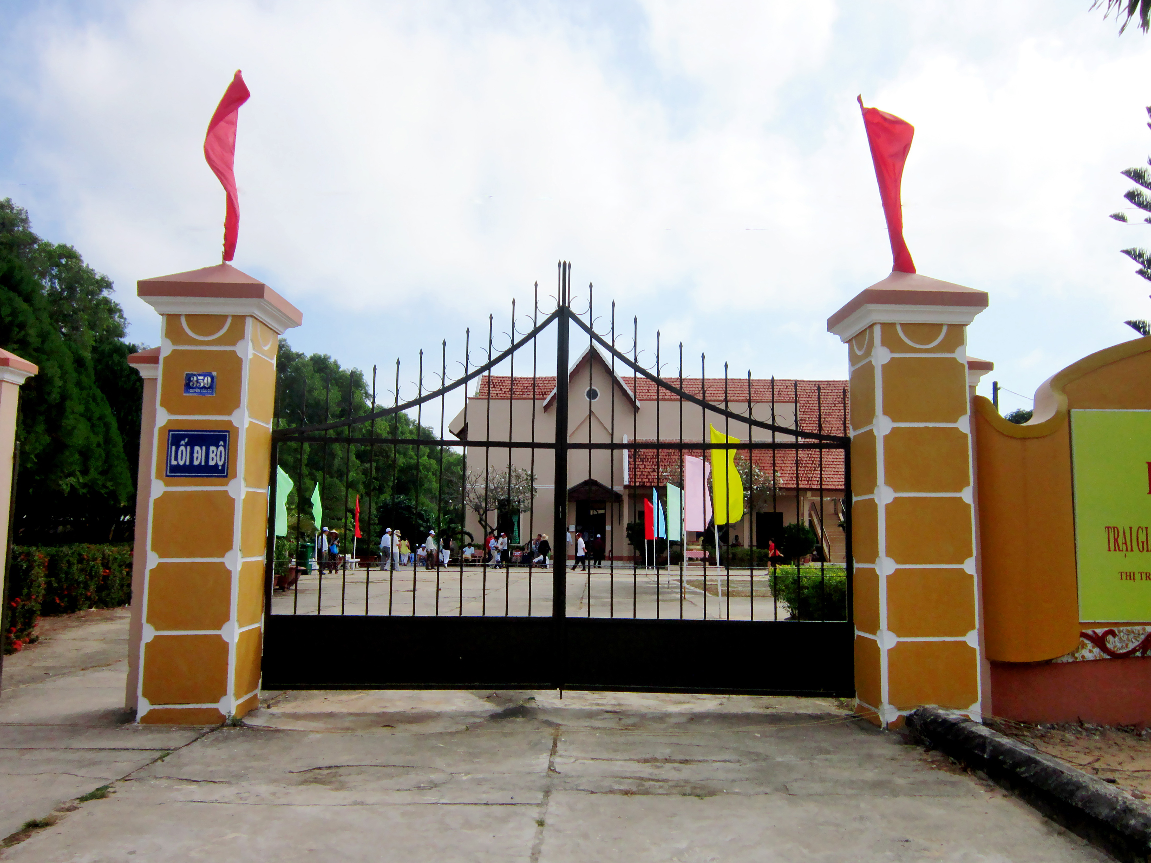 Trại giam Tù binh Chiến tranh Phú Quốc (Kiên Giang, Việt Nam).